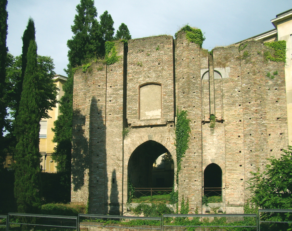 Vista di Porta Regale a Lodi